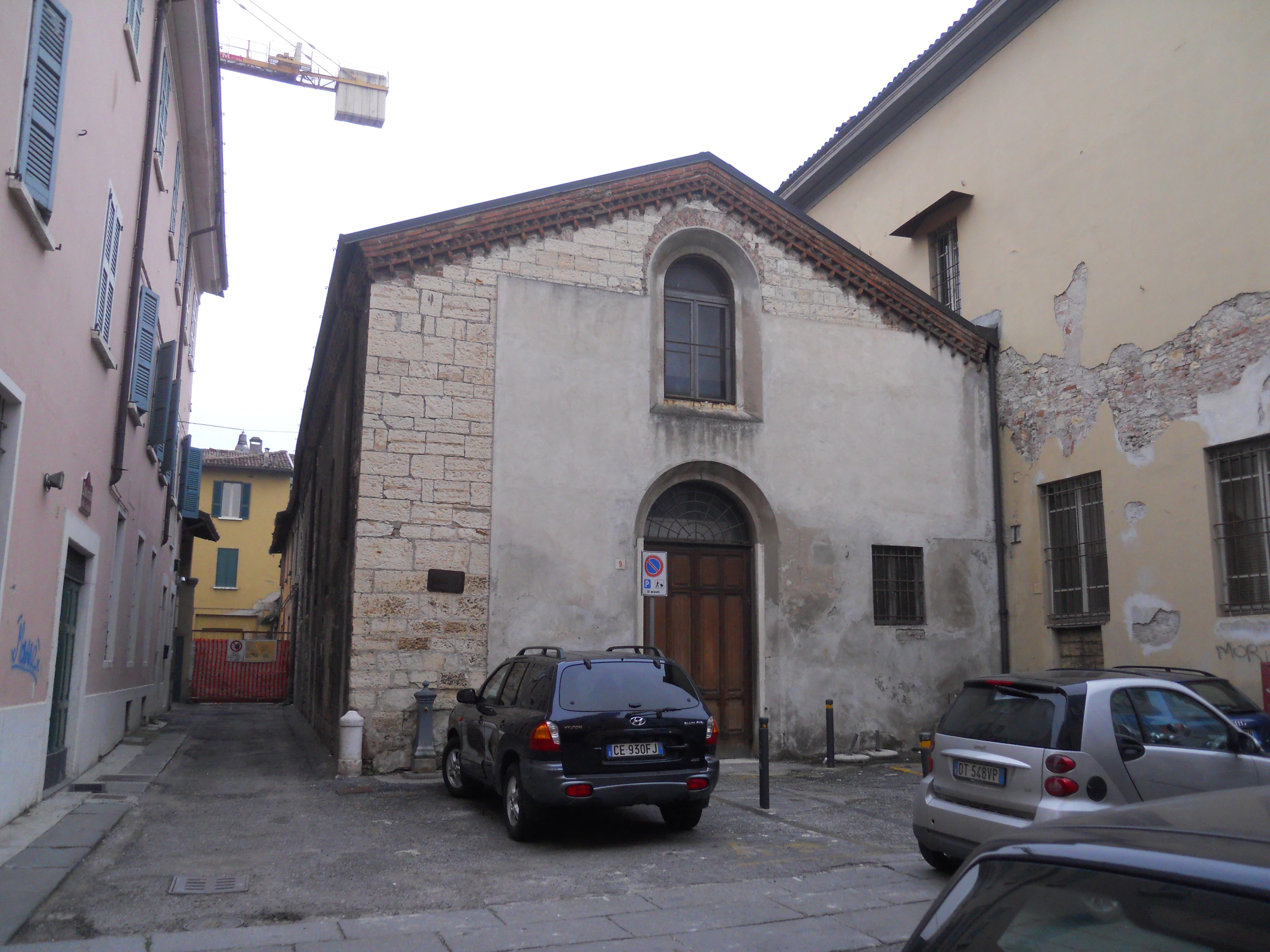 chiesa di san mattia alle grazie (brescia) facciata